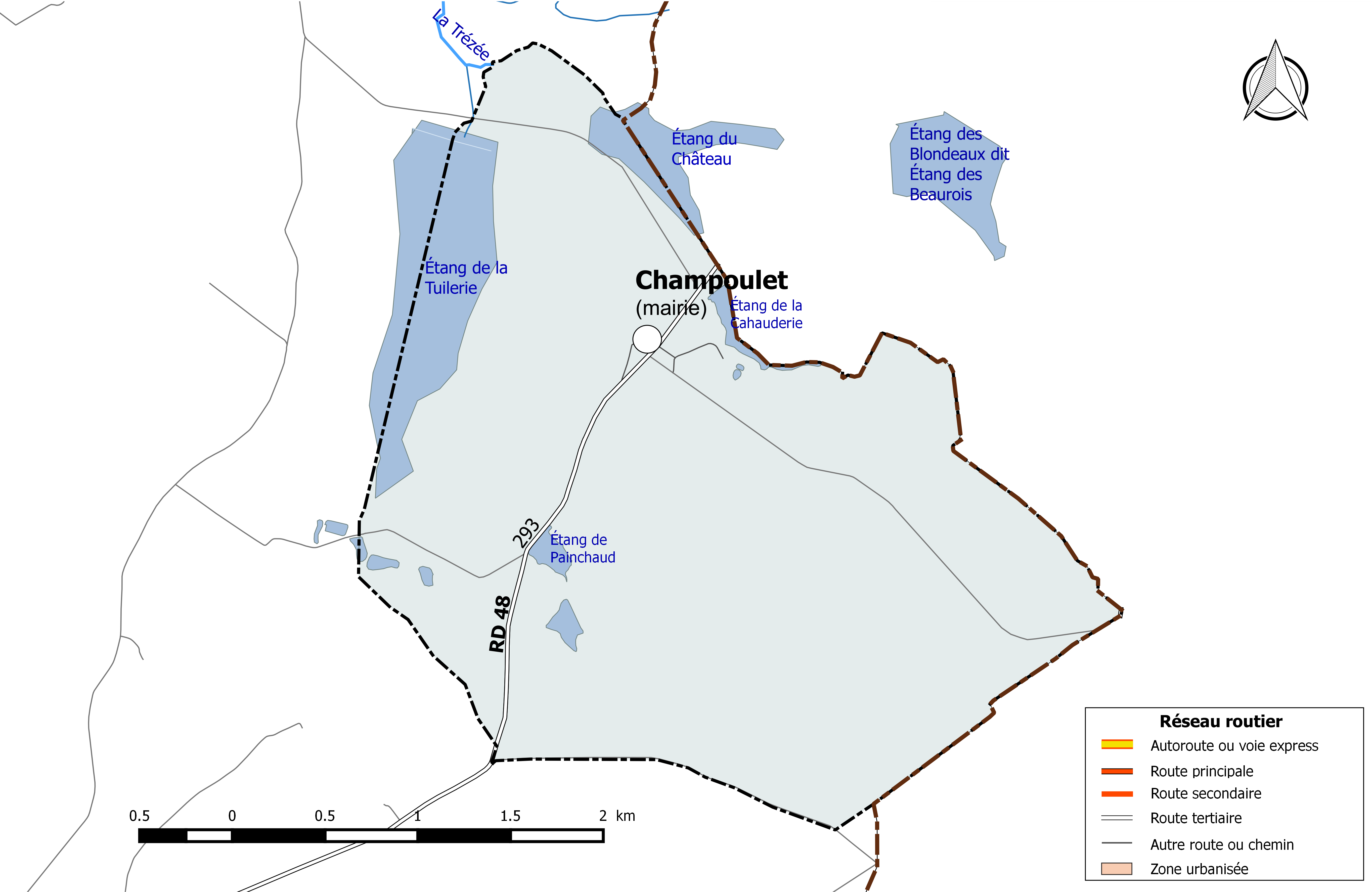 Carte du réseau routier de la commune de Champoulet.